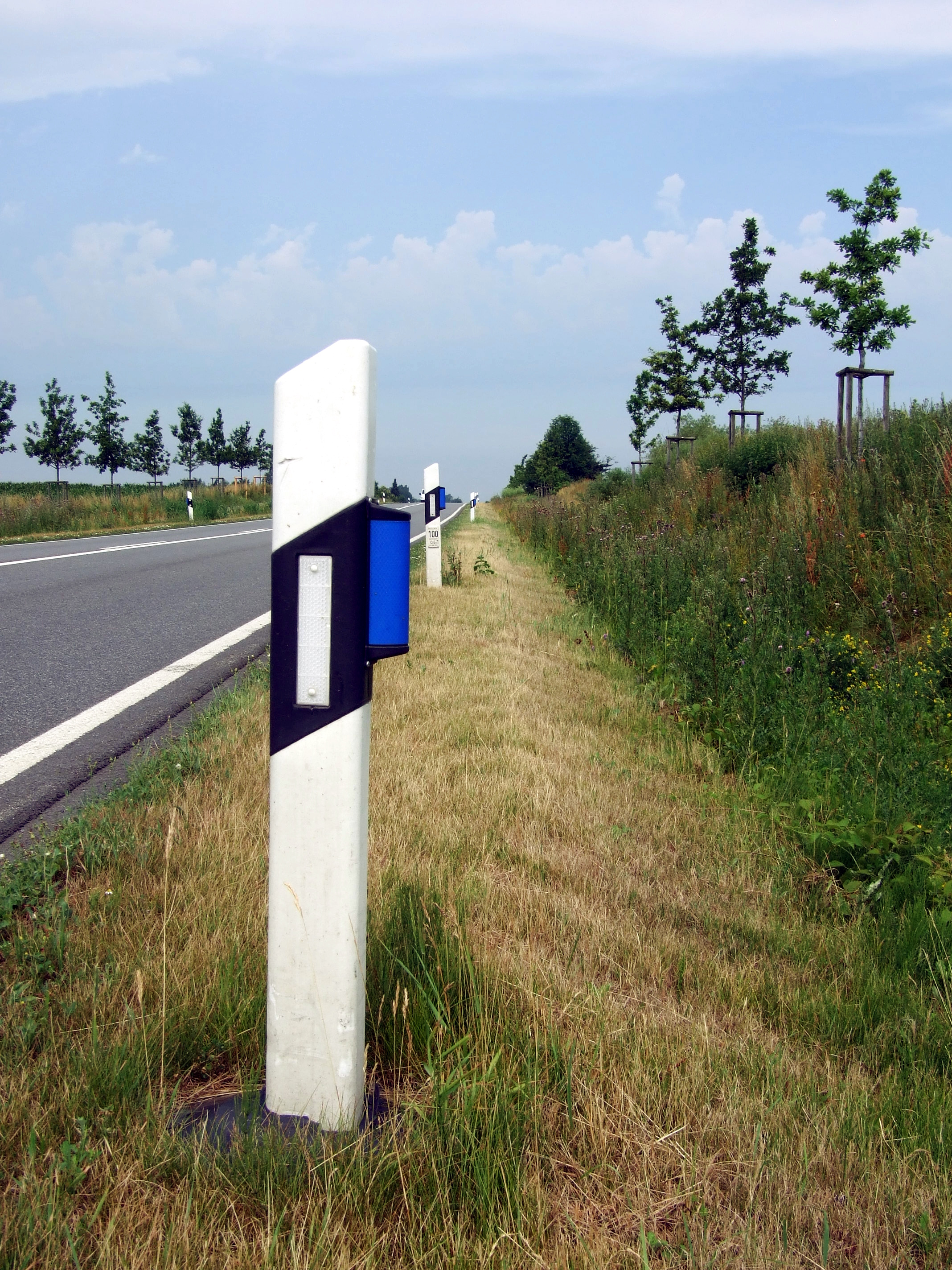 Leitpfosten mit Wildwarnreflektor